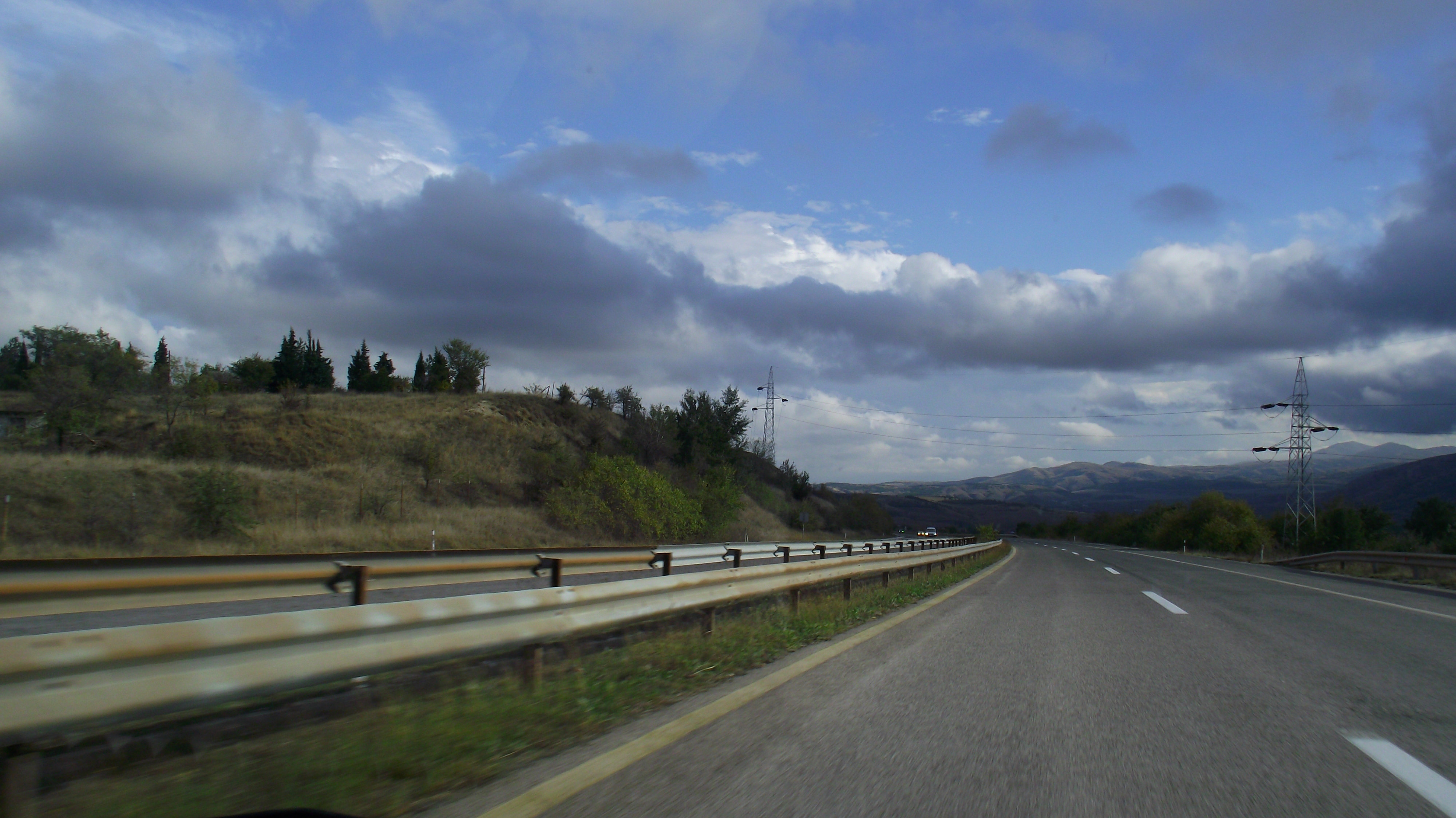 Автопат Александар Македонски